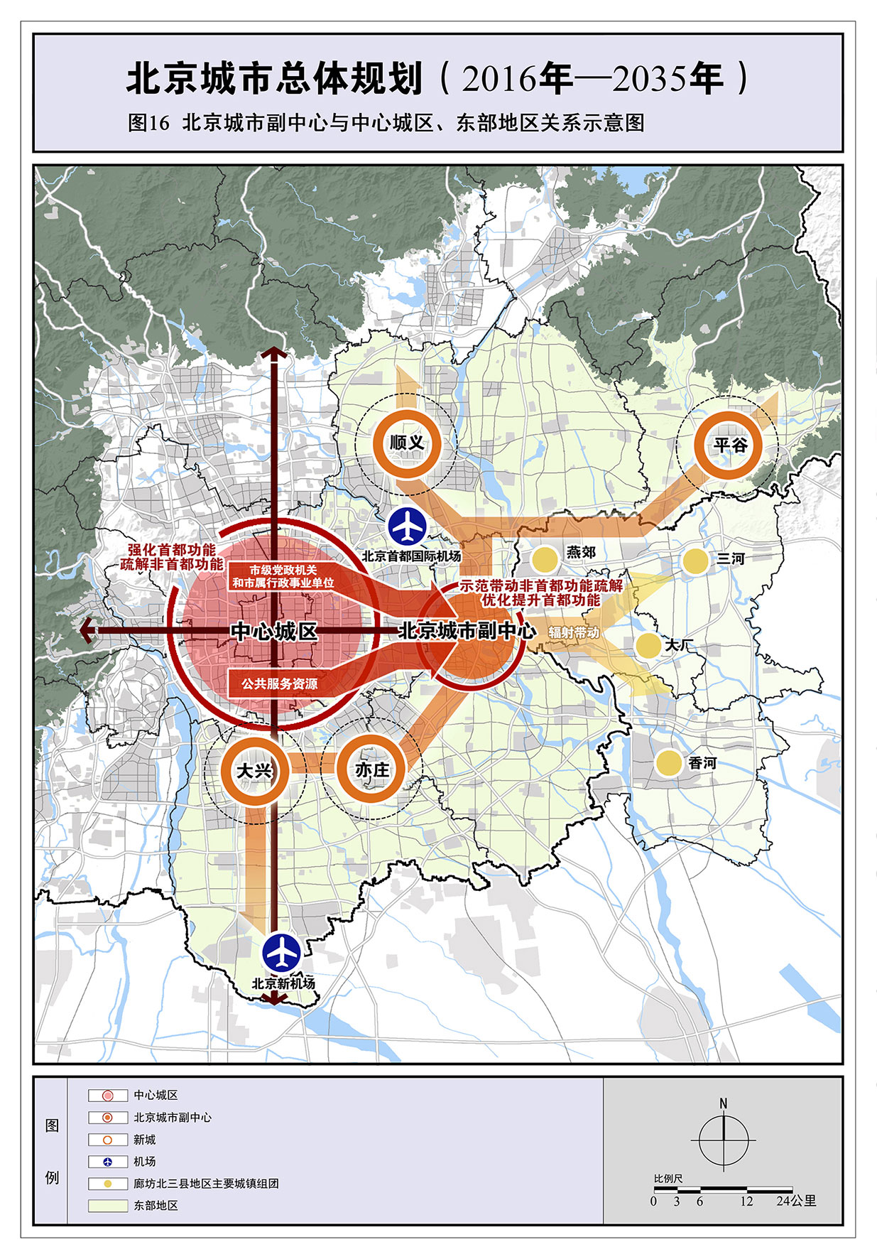 中文（中国大陆）: 北京城市总体规划（2016年－2035年）图16 北京城市副中心与中心城区、东部地区关系示意图